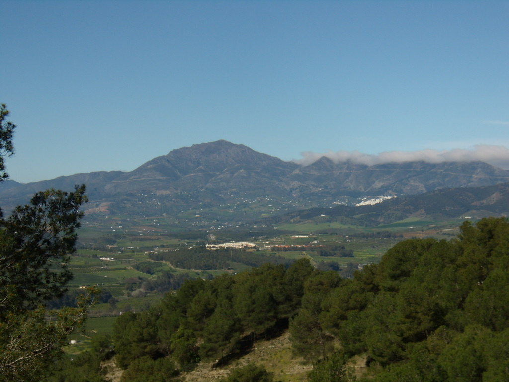 Sierra Prieta desde el Hacho de Pizarra. Casarabonela al fonde y Zalea en el centro.